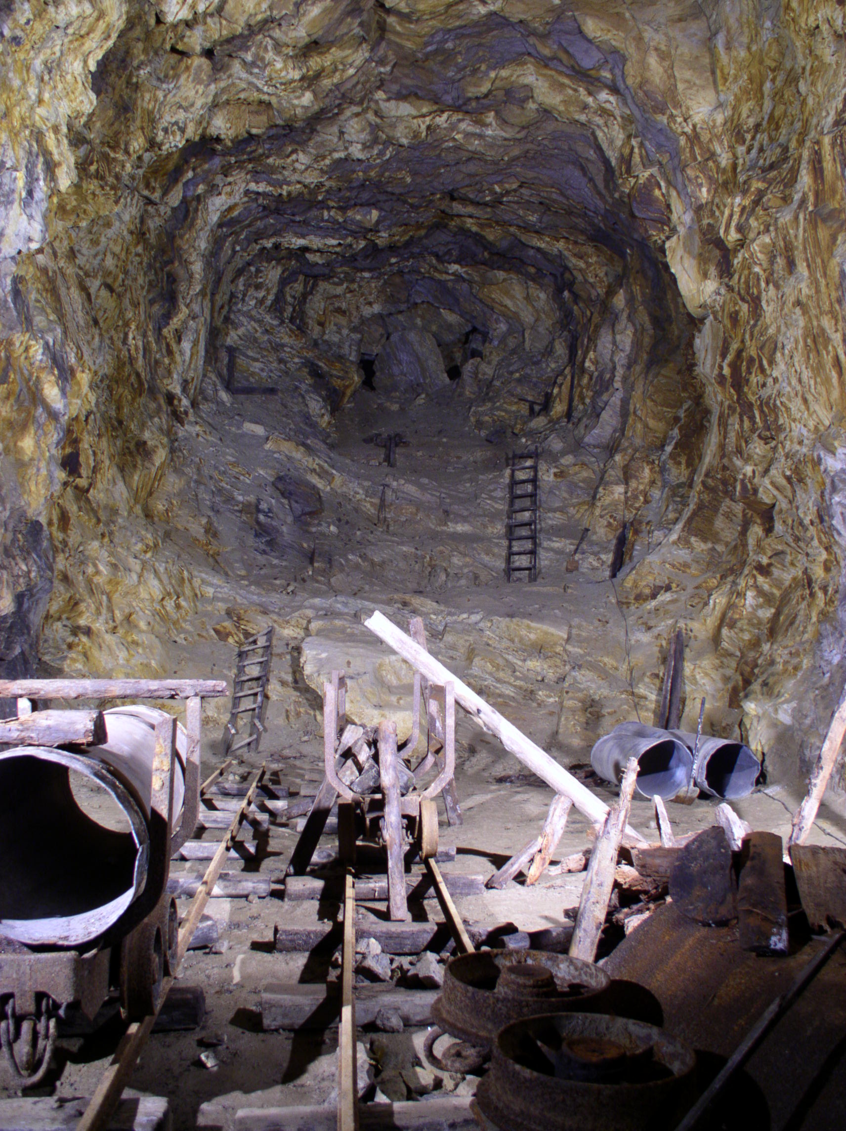 Góry Sowie, sztolnie - wejście od Rzeczki, 25 listopada 2003